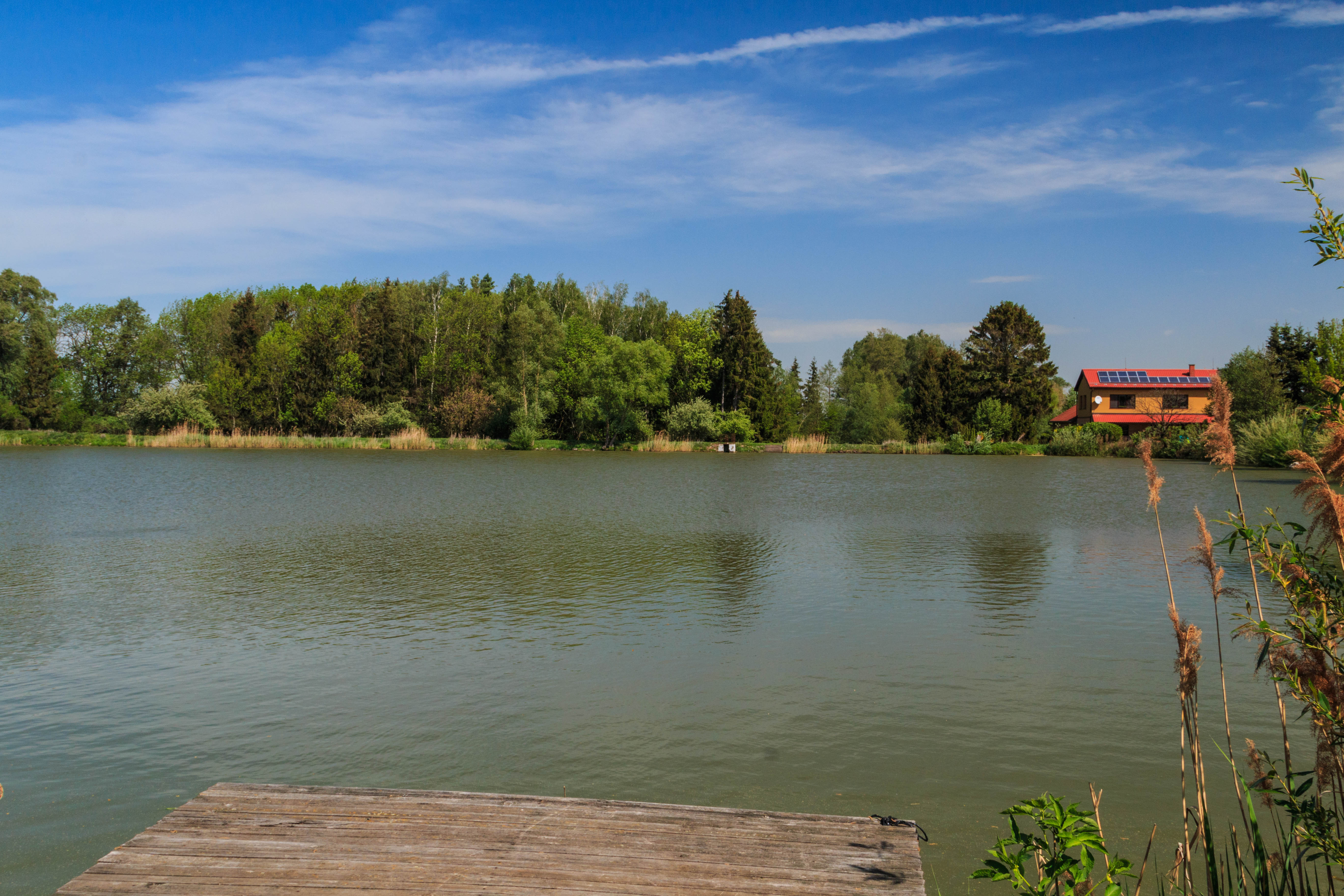 Červenecký rybník u Stolan Project: Vodstvo.